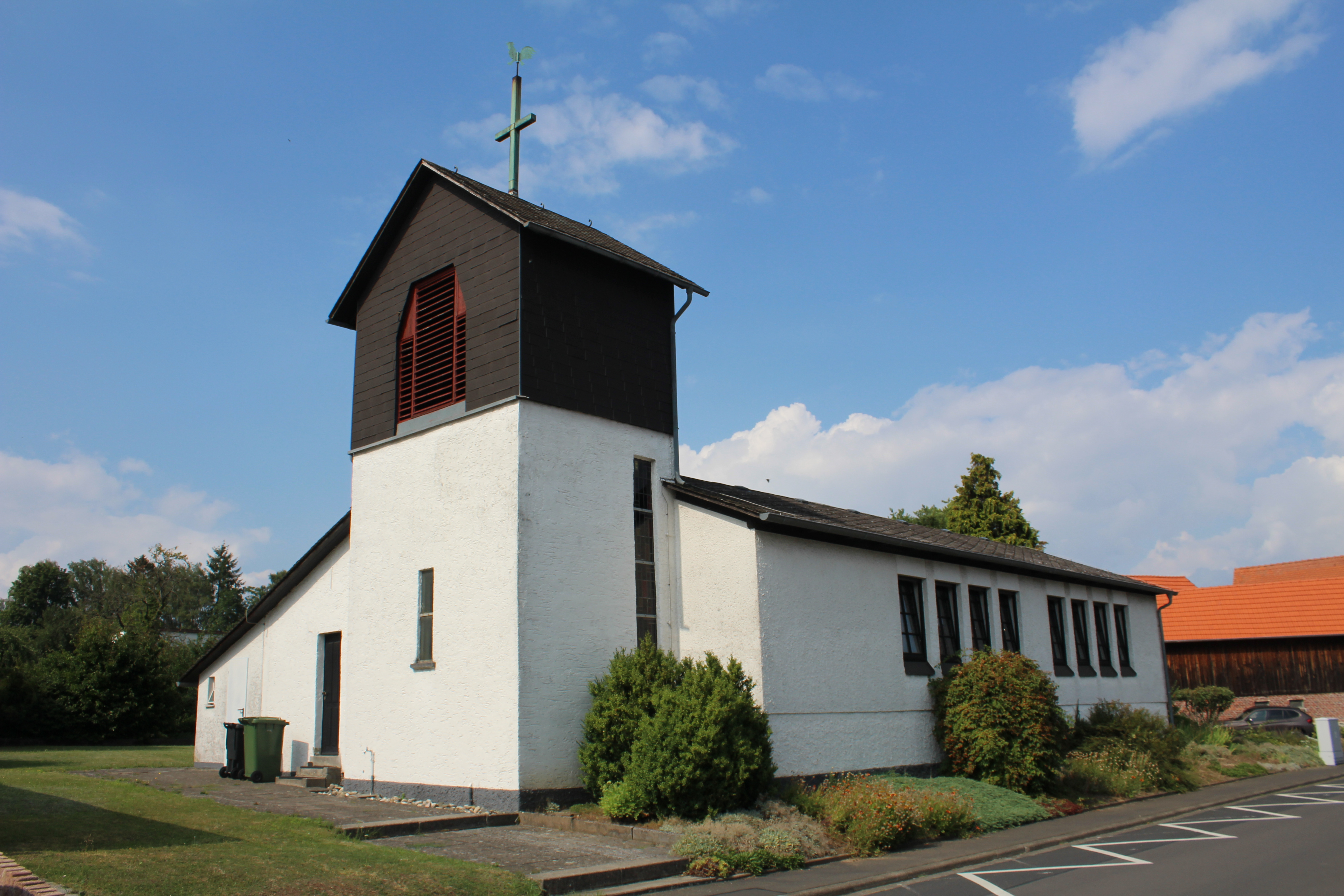 St. Maria Immaculata, Lich-Eberstadt, Landkreis Gießen, Hessen, Deutschland